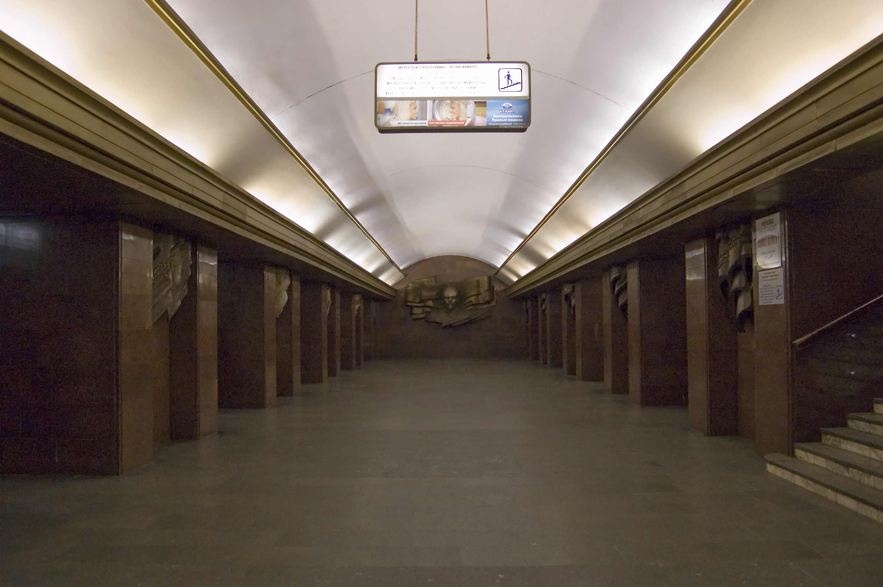 Станция метро «Театральная», центральный зал